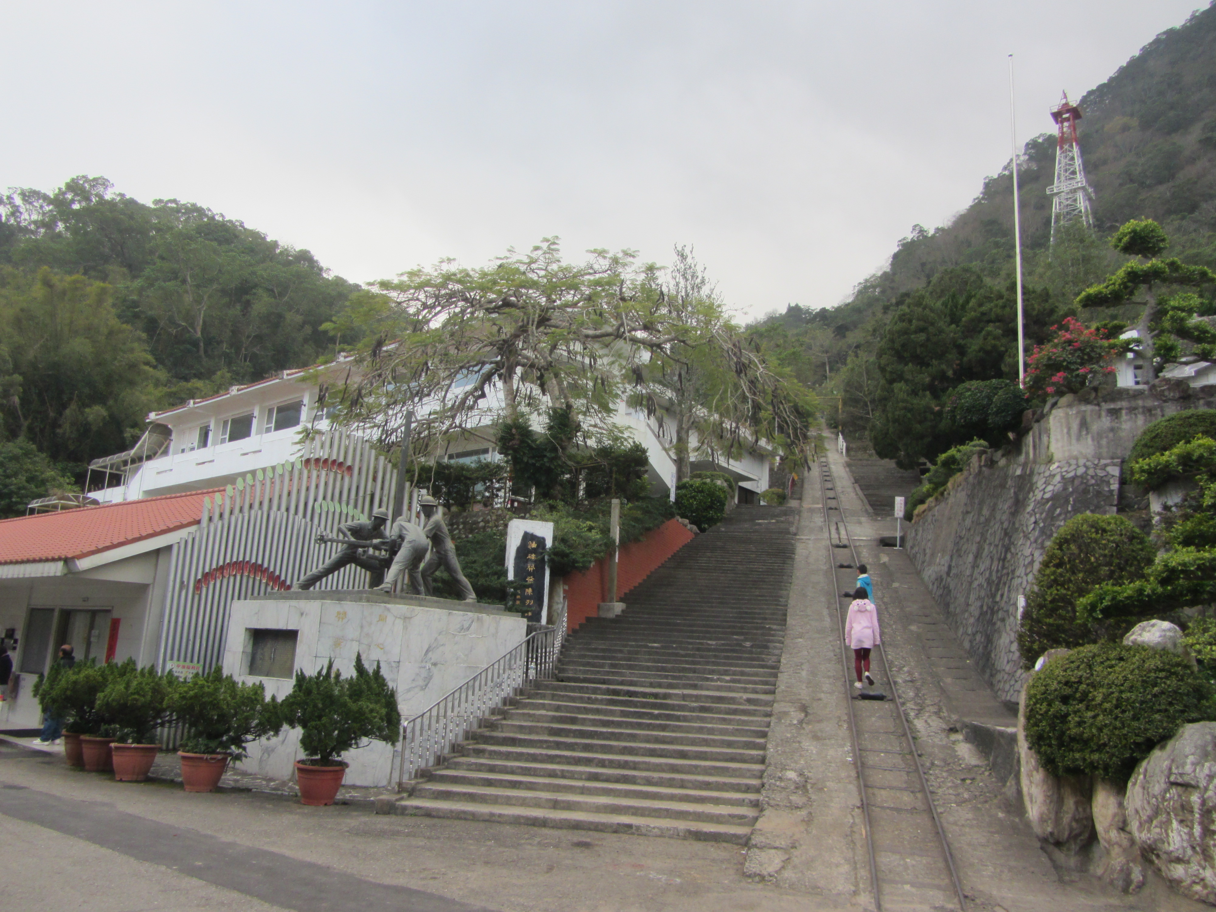 苗栗縣公館鄉出磺坑